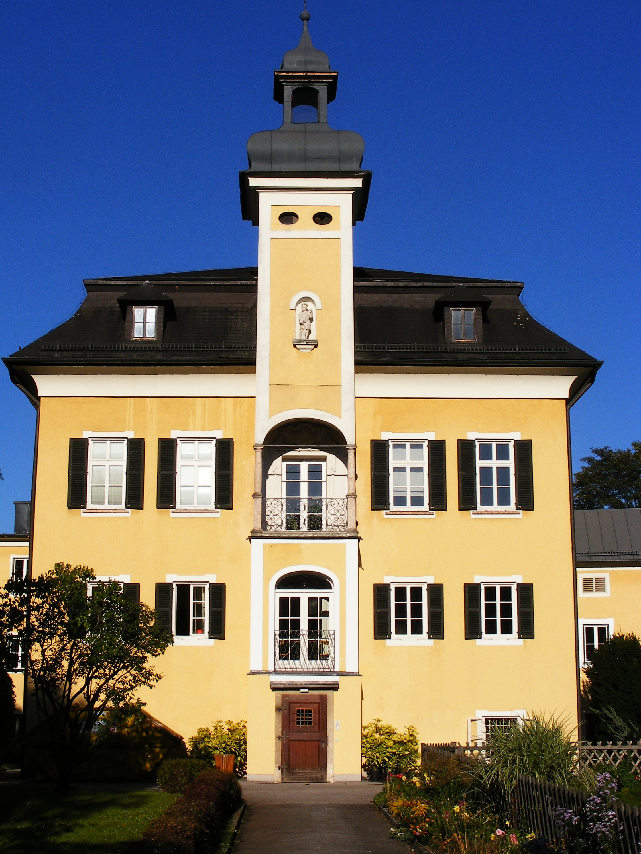 Lürzerhof, Salzburg (Frontansicht)